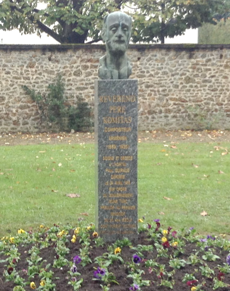 Կոմիտասի կիսանդրի, Փարիզ, Վիլ-Ժուիֆ հոգեբուժարանի բակում